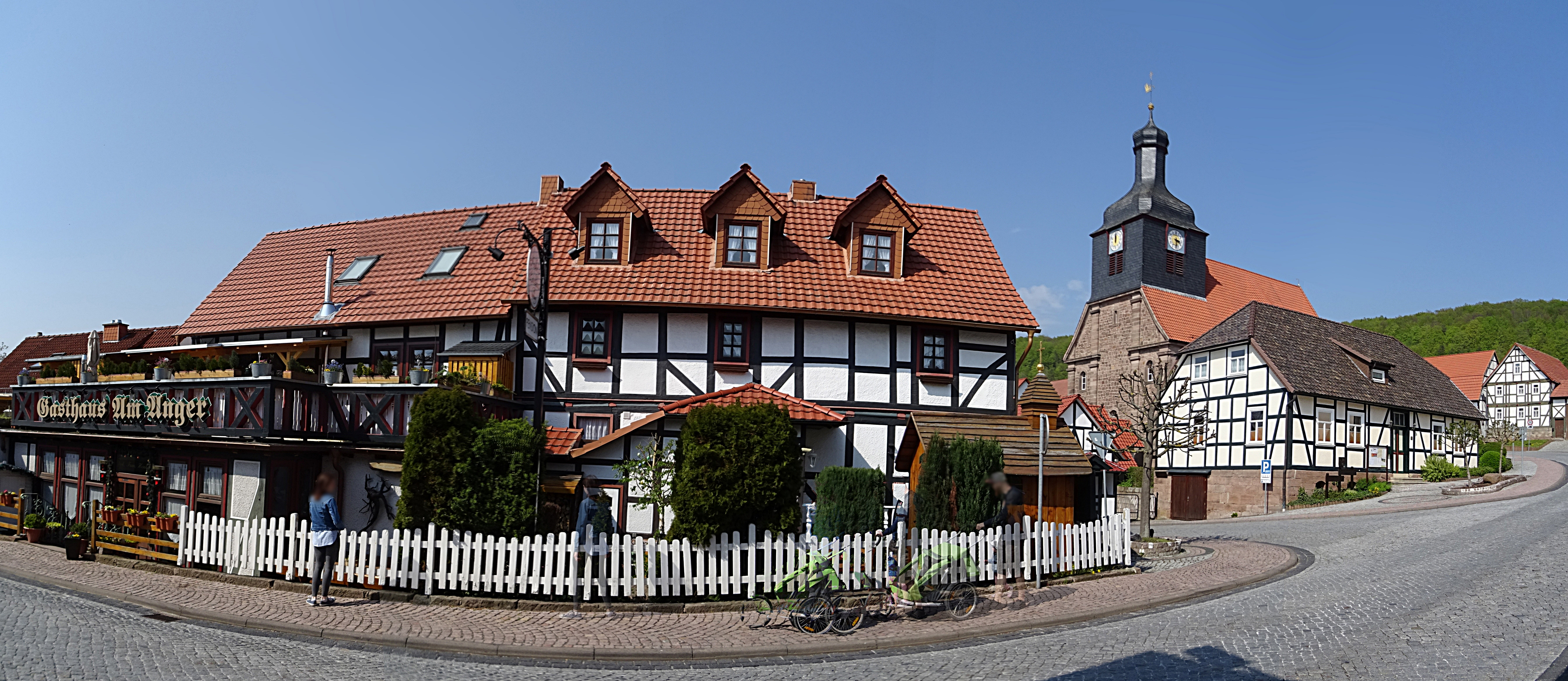 Wüstheuterode mit der Bonifatiuskirche